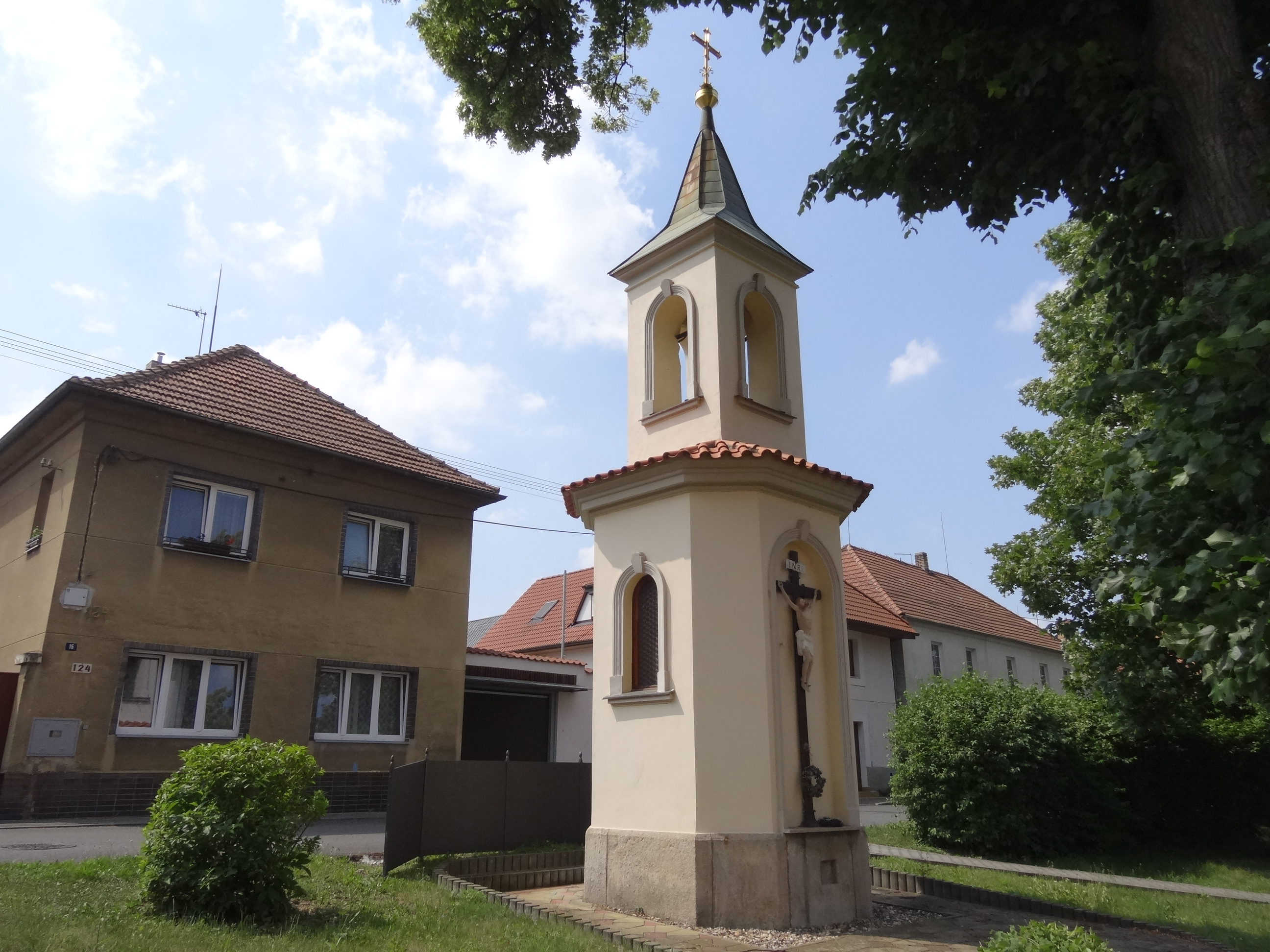 Jeneč - kaple se zvoničkou